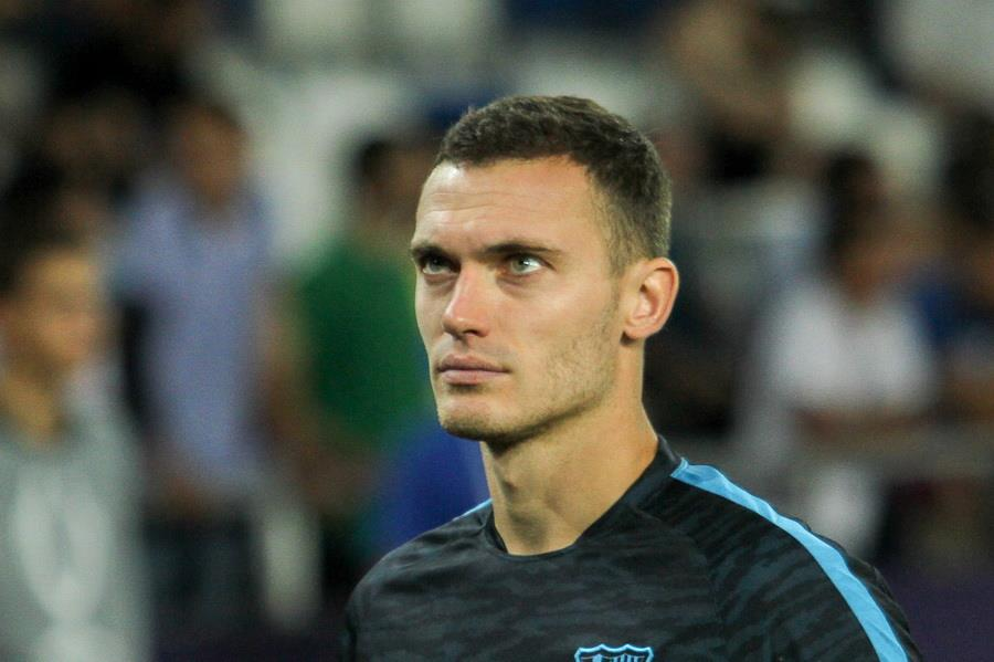 Перед матчем за Суперкубок УЄФА 2015 року у Тбілісі. Грузія